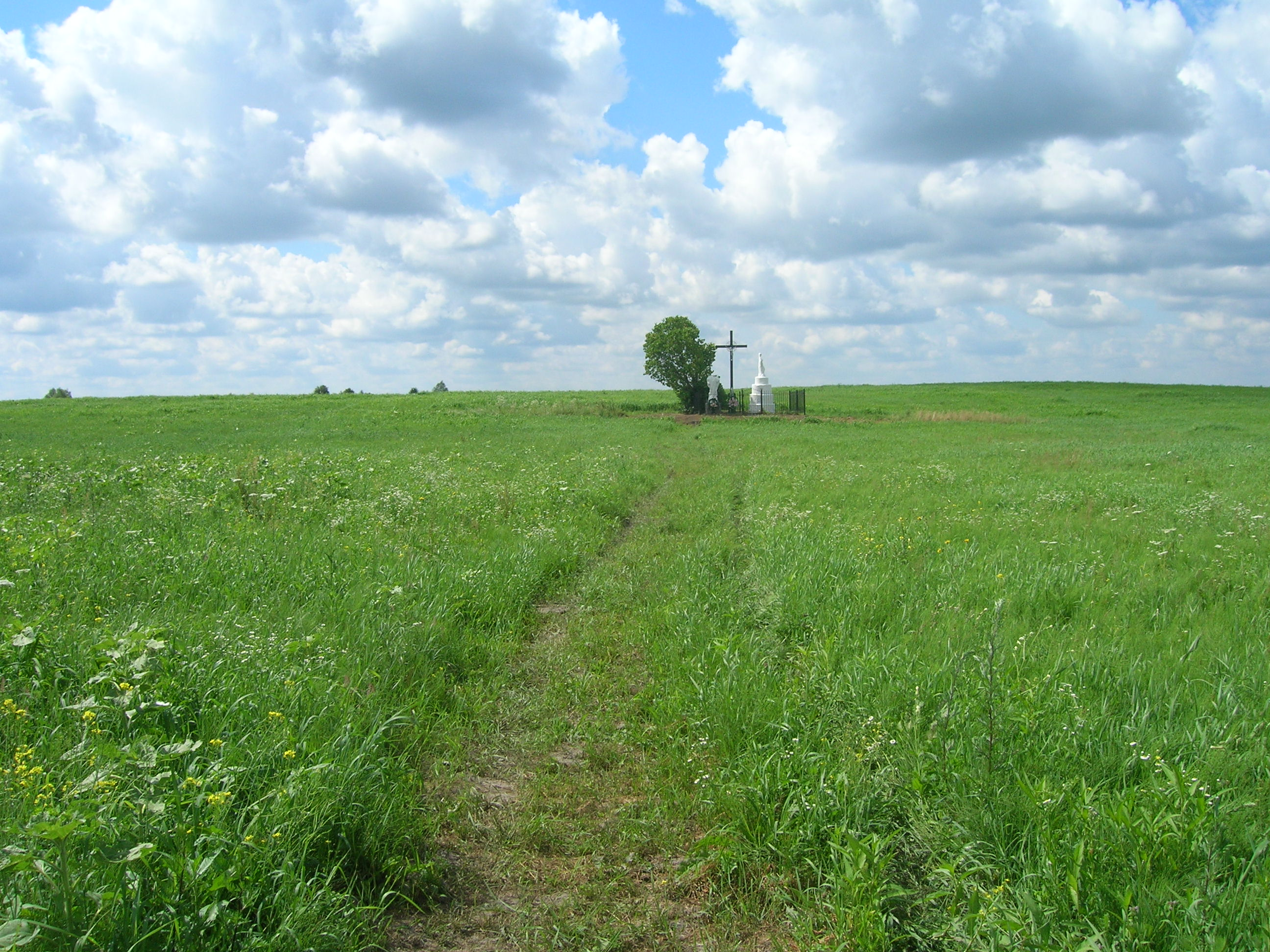 Krzyż i figura Matki Boskiej w Ostrówkach postawione w miejscu, gdzie stał kościół